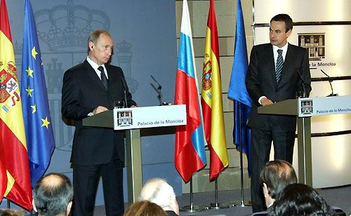 El presidente de Rusia, Vladimir Putin con el presidente del Gobierno de España, Rodríguez Zapatero en el palacio de La Moncloa. 9 de febrero de 2006.